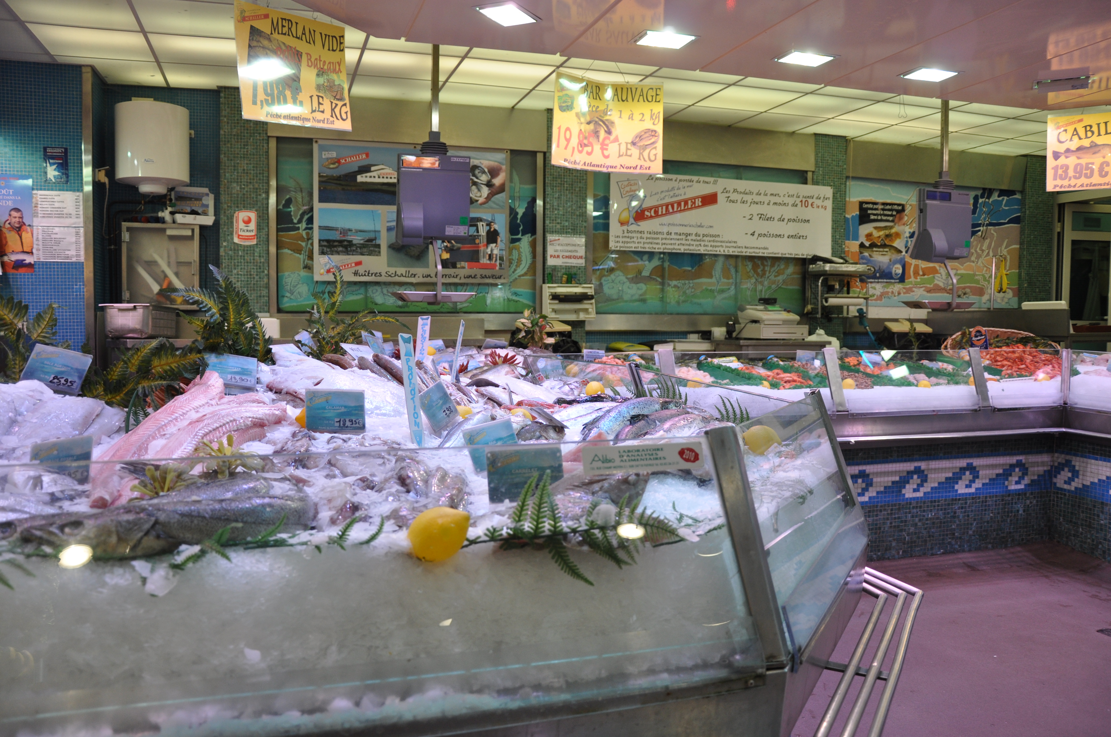 Marché couvert de Nancy, Nancy, Lorraine, France